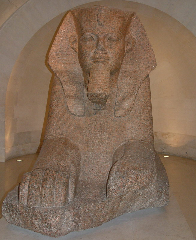 front view